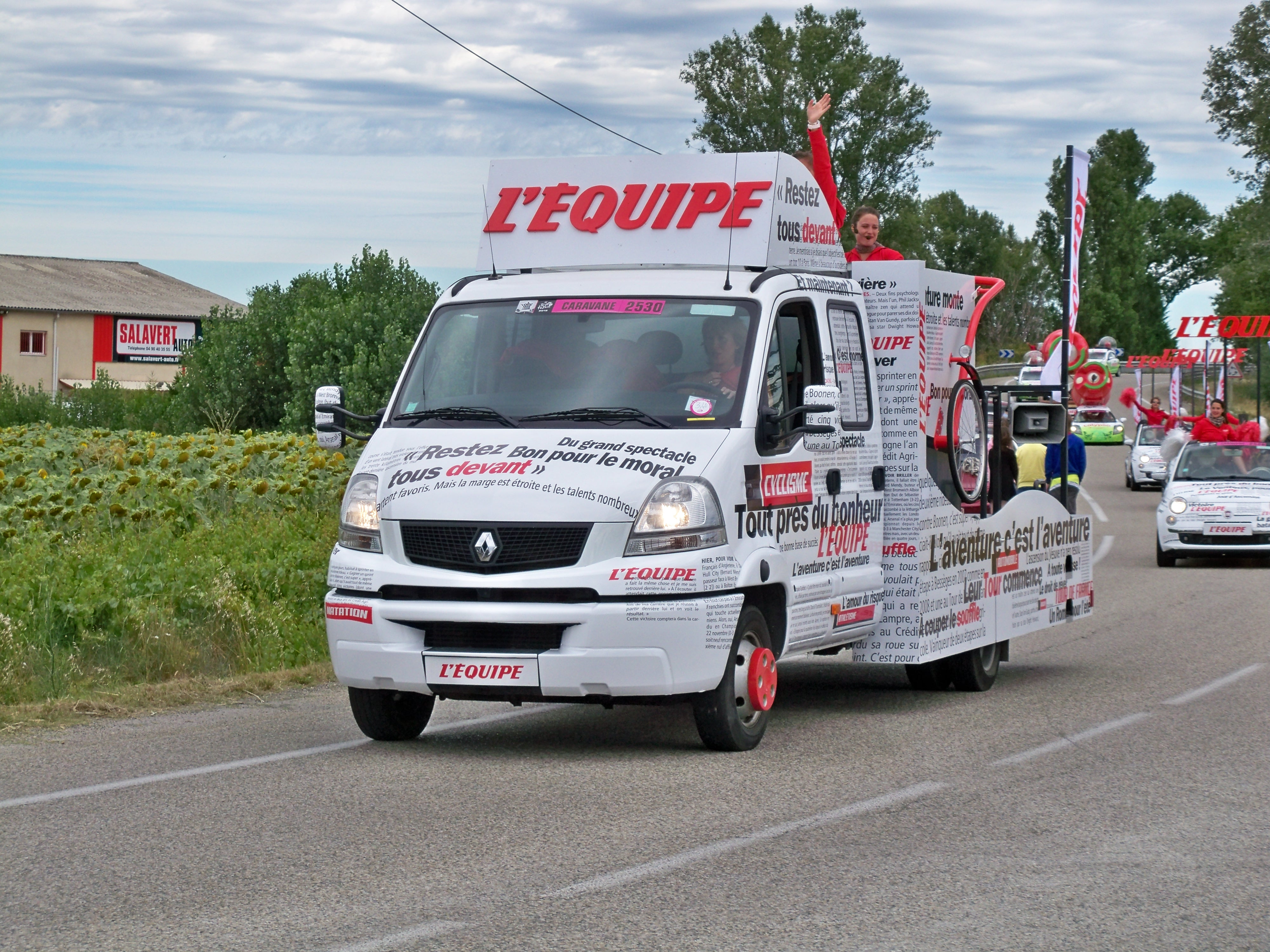 Caravane du tour de la 13ème étape 2012